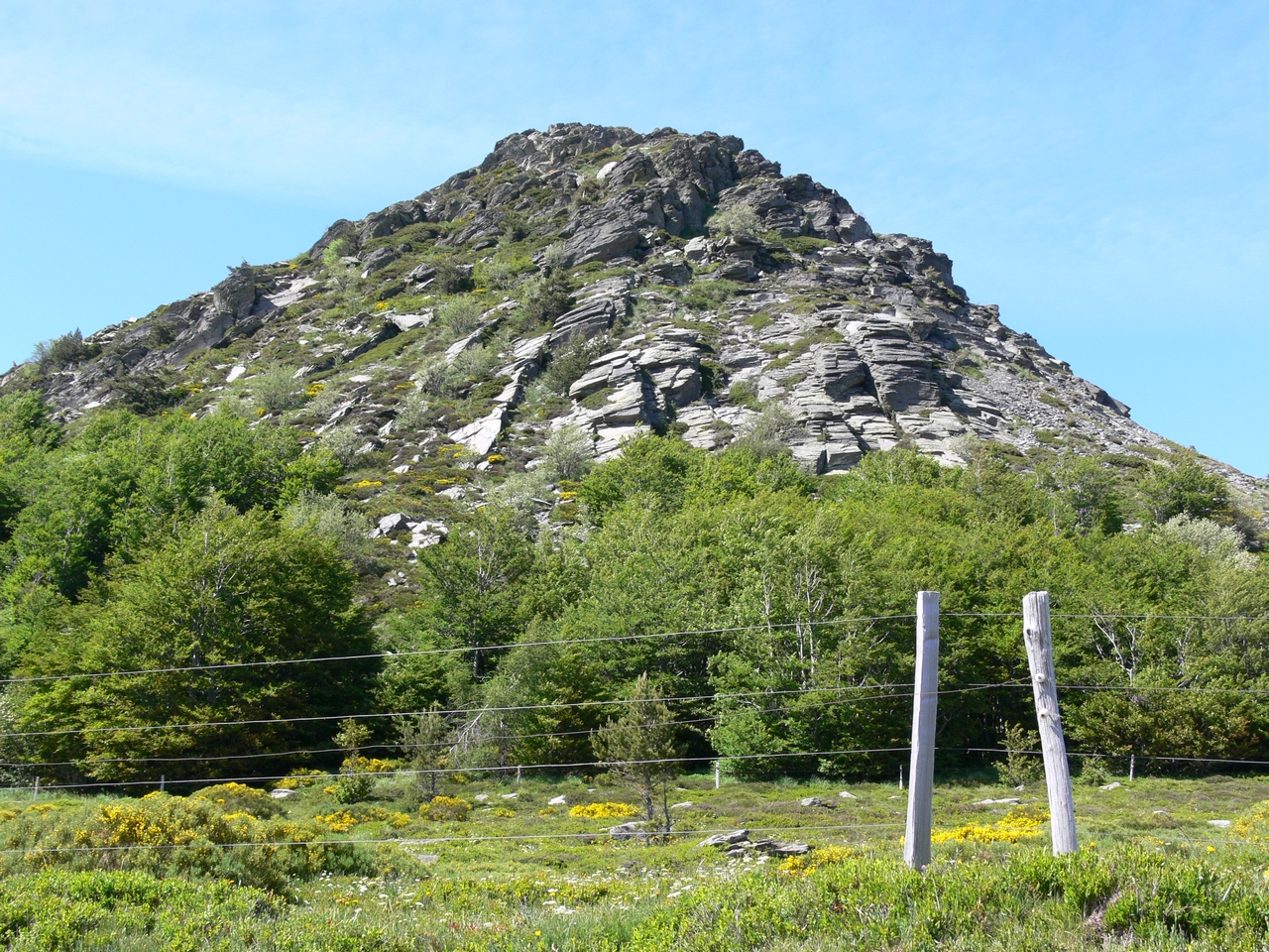 le mont Gerbier de Jonc, Ardèche, France, vue prise par Jacques Forêt le 14 juin 2006